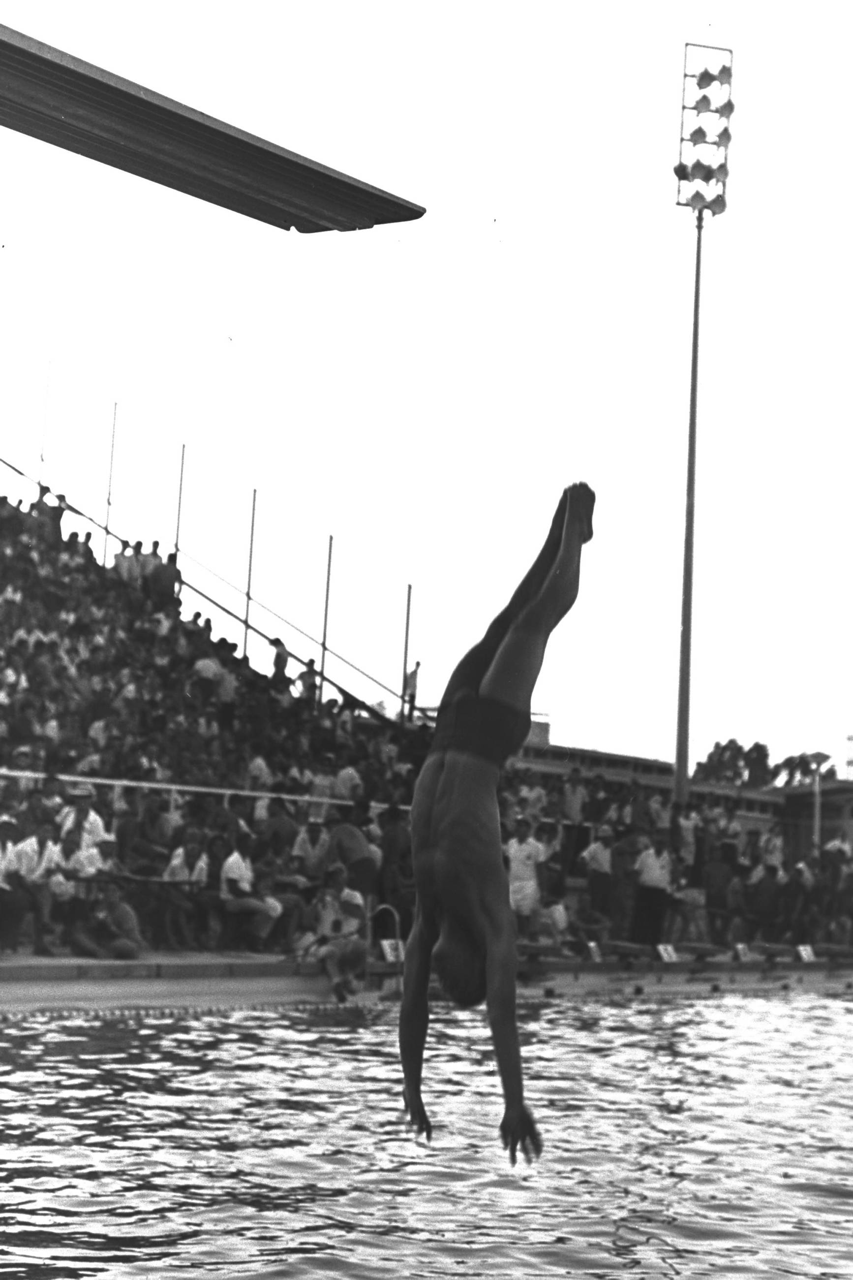 A diving competition at the 7th Maccabia Games, held at the new swimming pool in Yad Eliyahu. משחקי המכביה ה-7 בתל אביב. תחרות הקפיצה למים בבריכת השחיה החדשה ביד אליהו